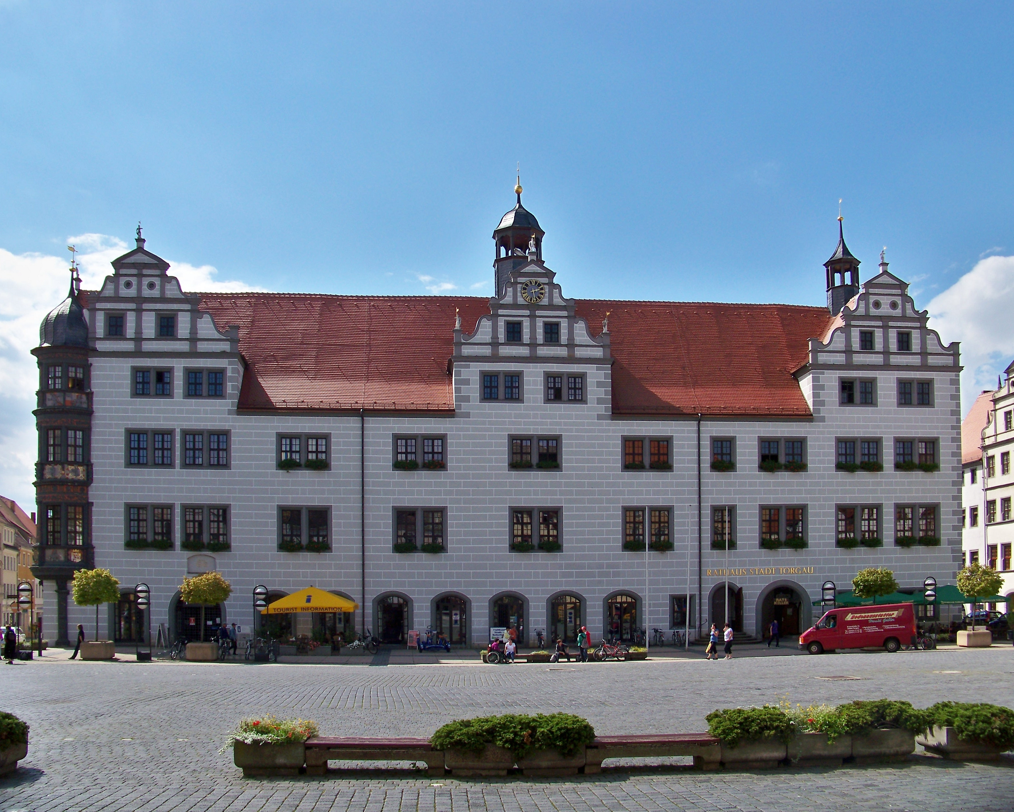 Rathaus der Stadt Torgau/Elbe in Sachsen, Deutschland Baujahr: 1565 Baustil: Renaissance